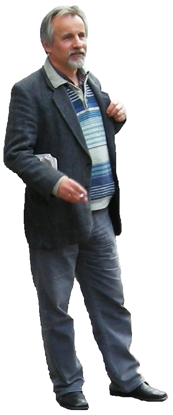 Fotografię wykonano podczas imprezy "Ulica Poetycka" w Zamościu dnia 24.05.2008 r. o godz. 15:35 na ul. Stefana Żeromskiego